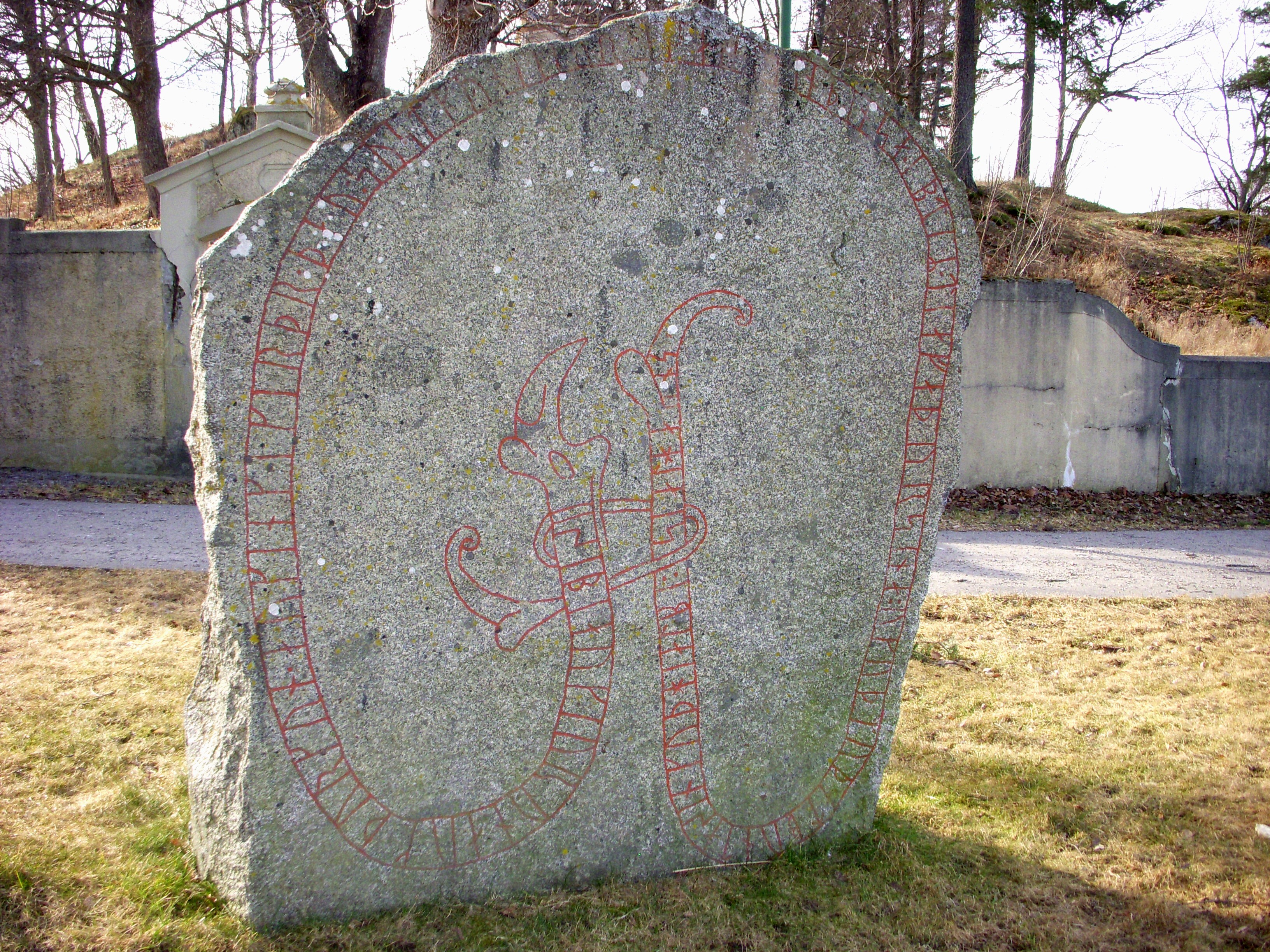 Södermanlands runinskrifter 288 vid Hågelby gård